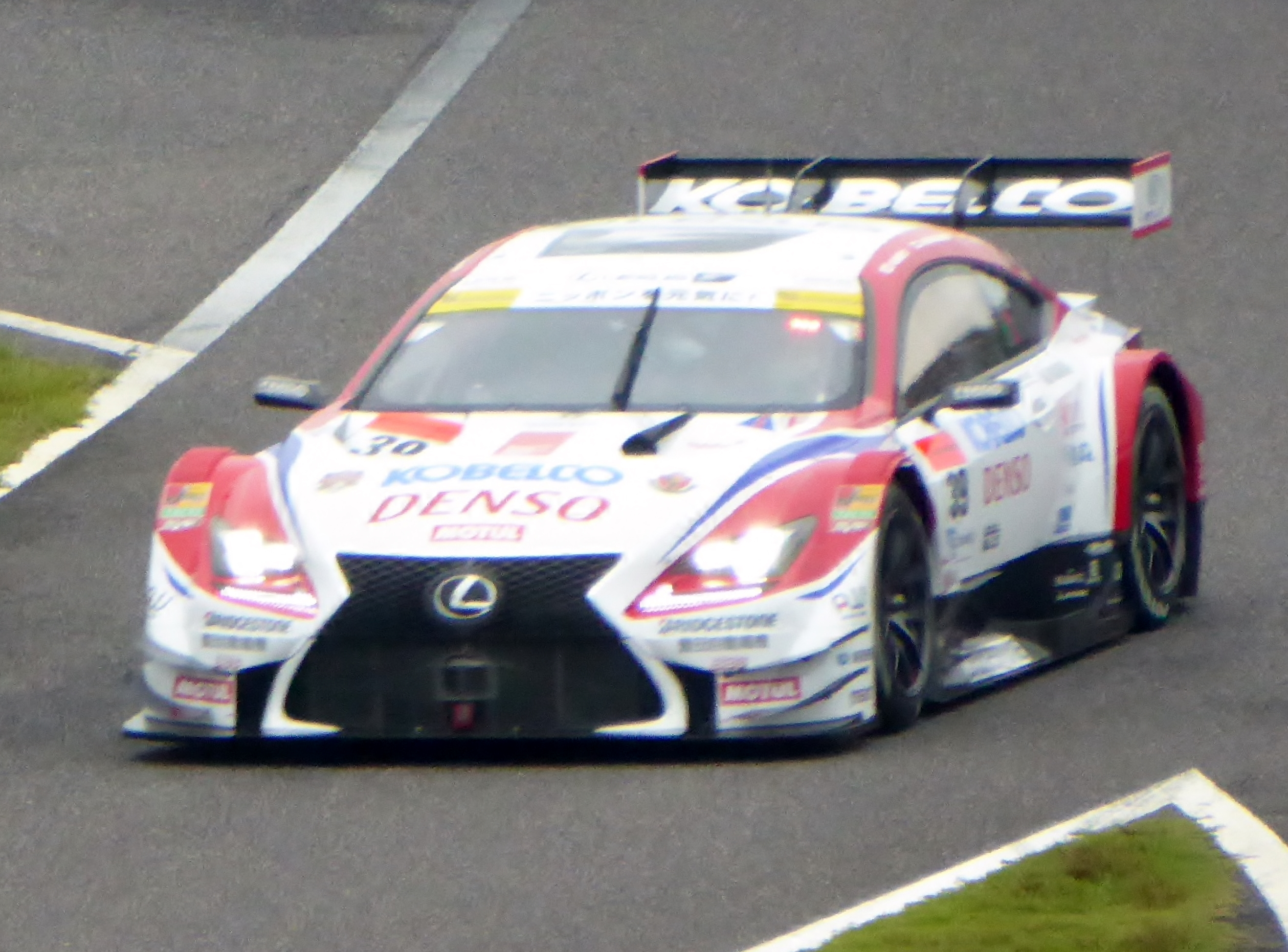 2015年鈴鹿1000㎞において39号車DENSO KOBELCO RC Fを撮影。